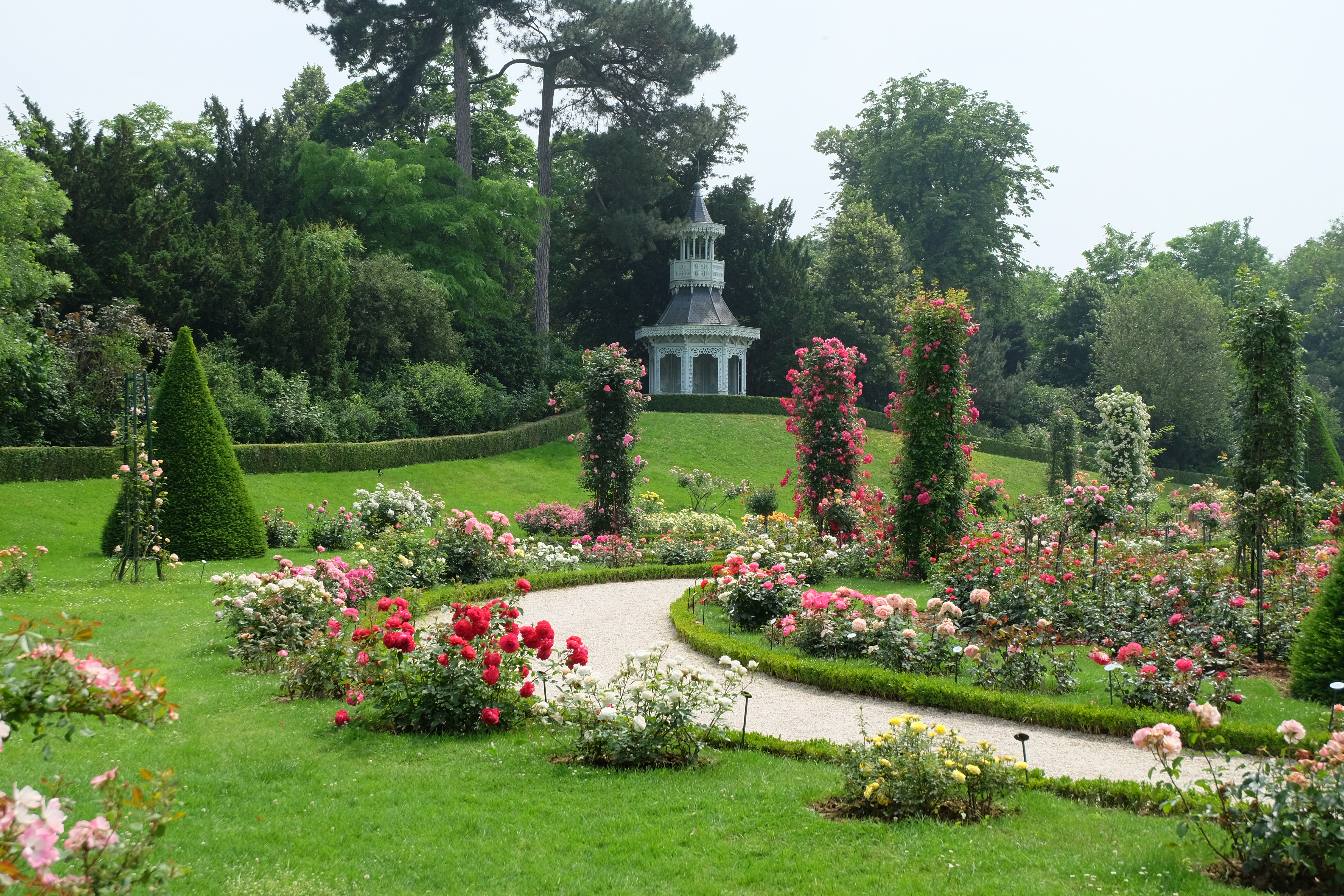 Parc de Bagatelle